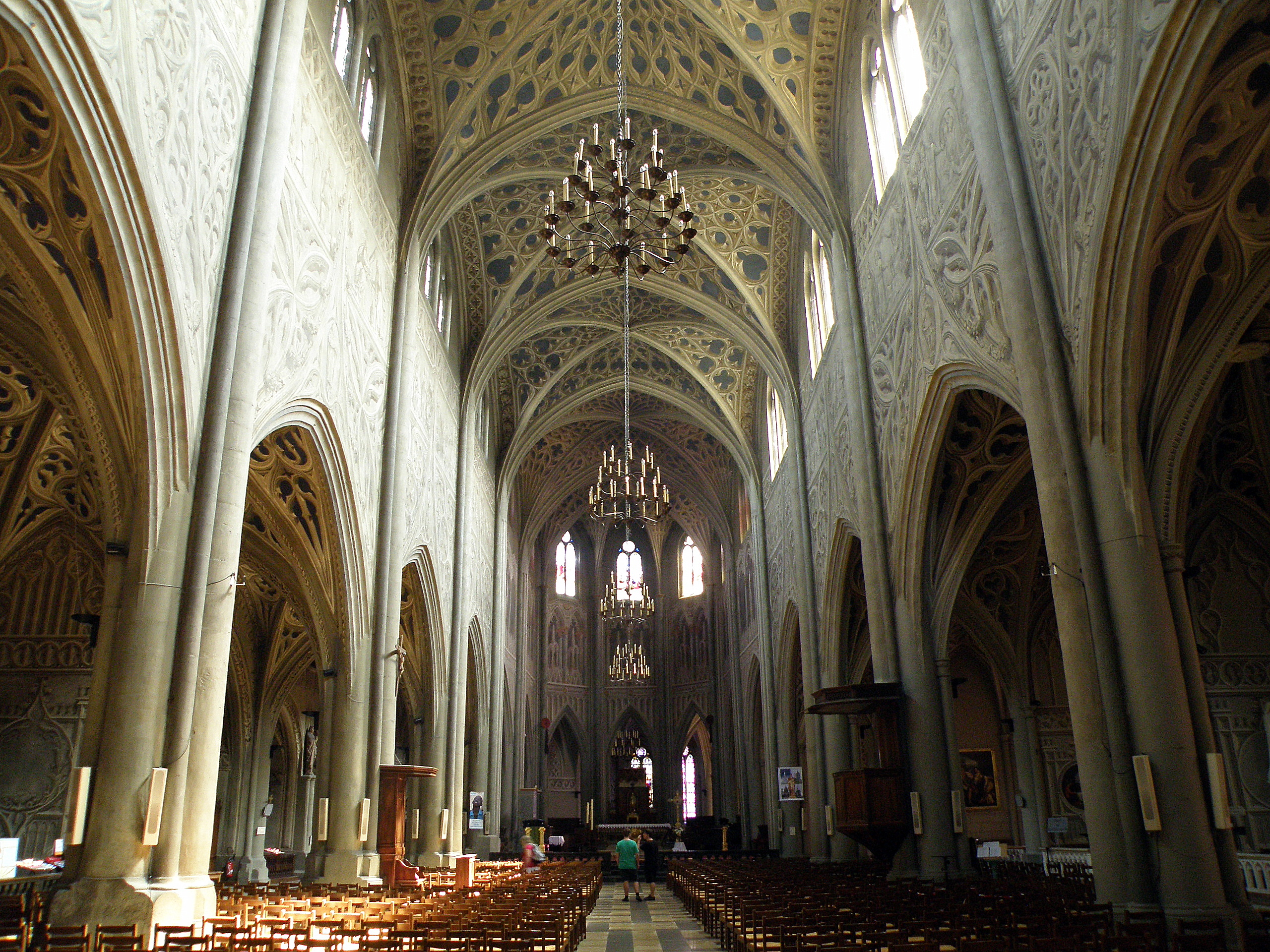 Chambéry, ville et préfecture du département de la Savoie (région Rhône-Alpes, France). Cathédrale Saint-François-de-Sales.